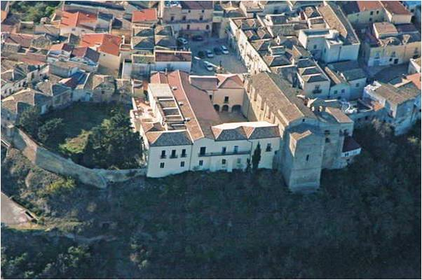 Visione aerea della chiesa di San Francesco (destra) e del suo monastero con chiostro (sinistra), oggi sede della cooperativa culturale Arenacea